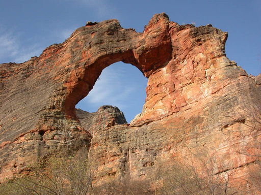 Pedra Furada, Parque Nacional Serra da Capivara, estado do Piauí, Brasil.